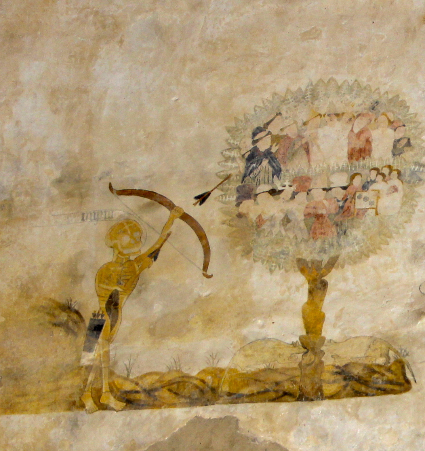 Détail d'une fresque de Danse macabre dans la salle où l'on veillait les moines récemment décédés.